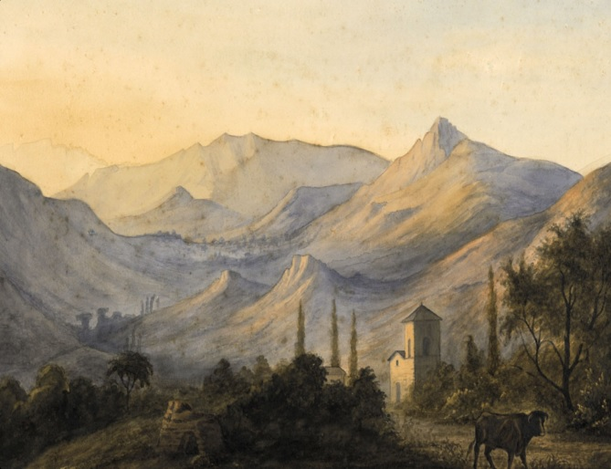 Pedro José Amado Pissis